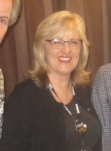 Janet Healy au festival international d'animation d'Annecy